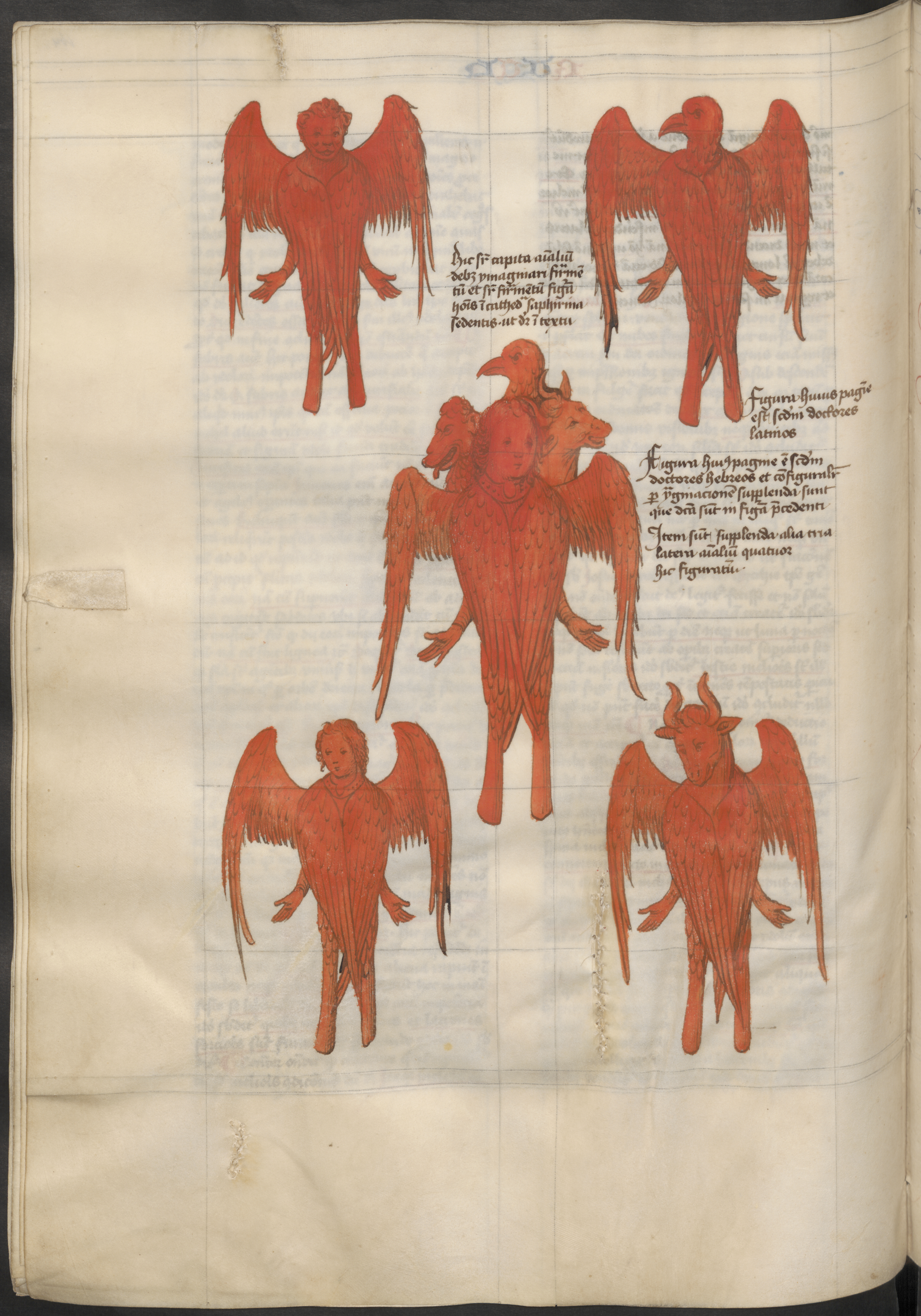 Hs. 252, f. 164v. Tetramorf.